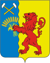 Герб Новокубанского района Краснодарского края